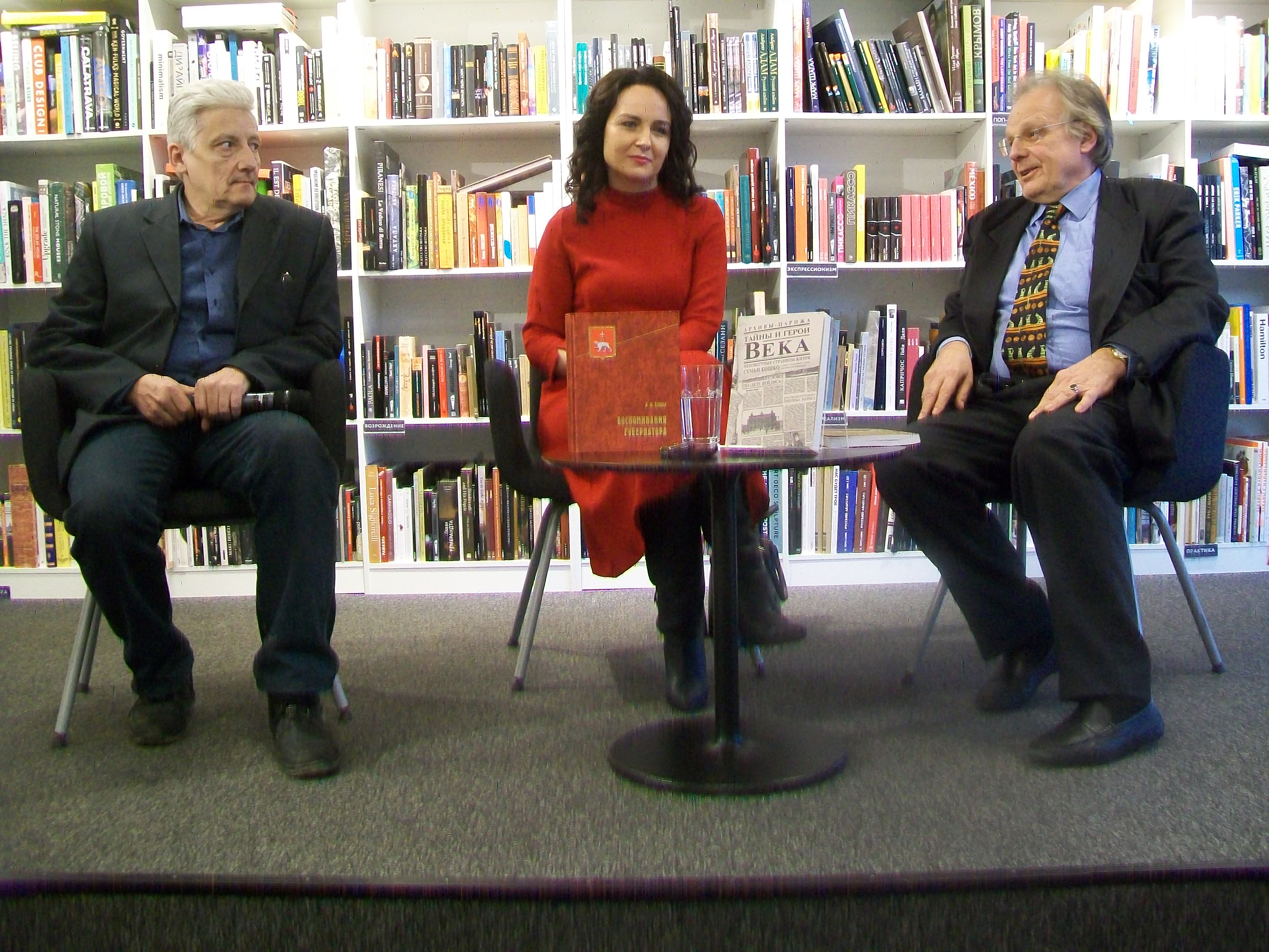 Заместитель директора Демидовского института Николай Павловский (слева), Анна Эспарса (в центре) и журналист Дмитрий де Кошко (справа). Презентация книги мемуаров Ивана Кошко в Ельцин-центре, магазин Пиотровский, 29 марта 2018 года